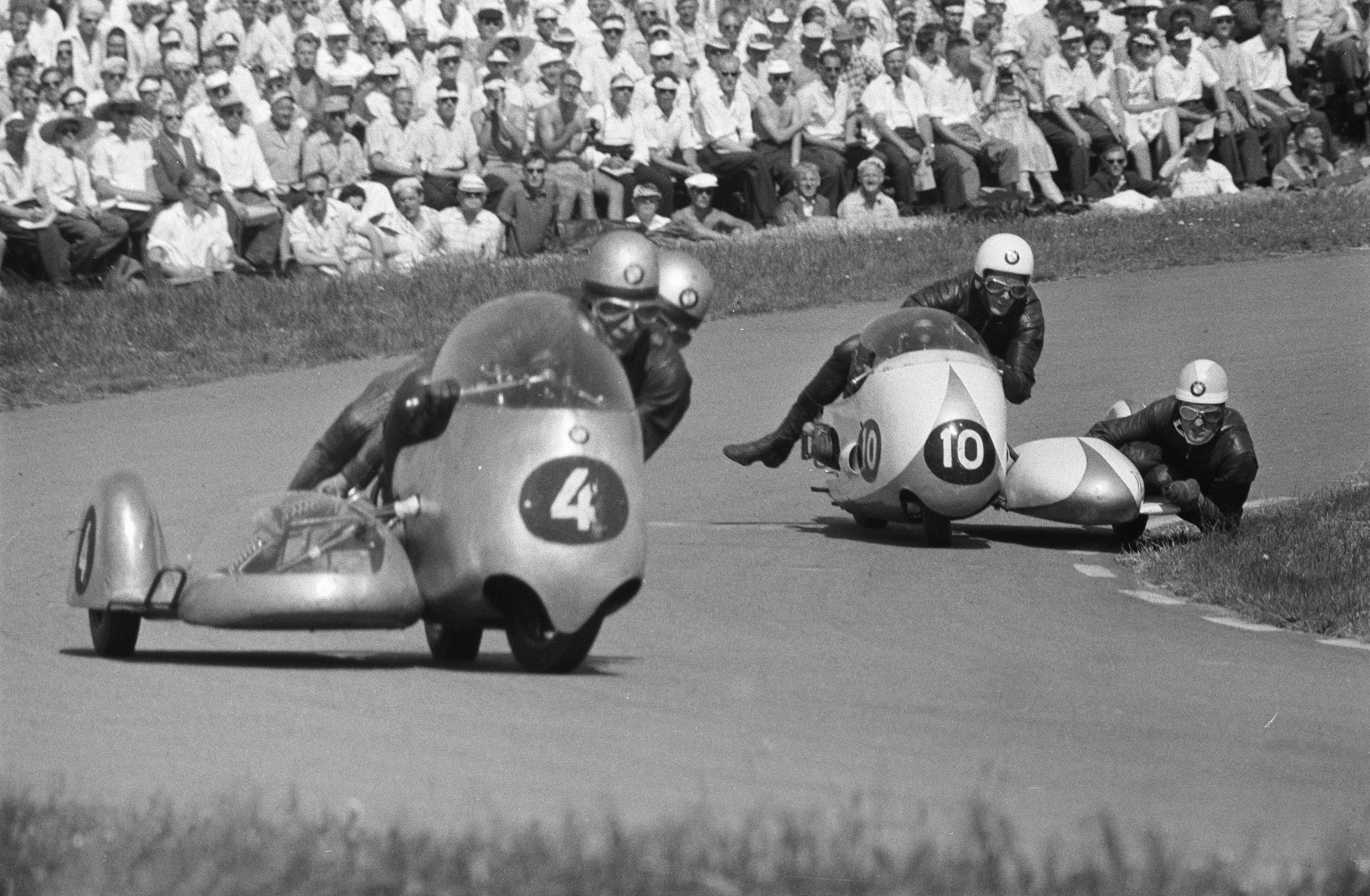 Collectie / Archief : Fotocollectie Anefo Reportage / Serie : TT Assen 1960 Beschrijving : Zijspanrace Datum : 26 juni 1960 Locatie : Assen Trefwoorden : motorsport Instellingsnaam : TT Fotograaf : Bilsen, Joop van / Anefo Auteursrechthebbende : Nationaal Archief Materiaalsoort : Negatief (zwart/wit) Nummer archiefinventaris : bekijk toegang 2.24.01.05 Bestanddeelnummer : 911-3663